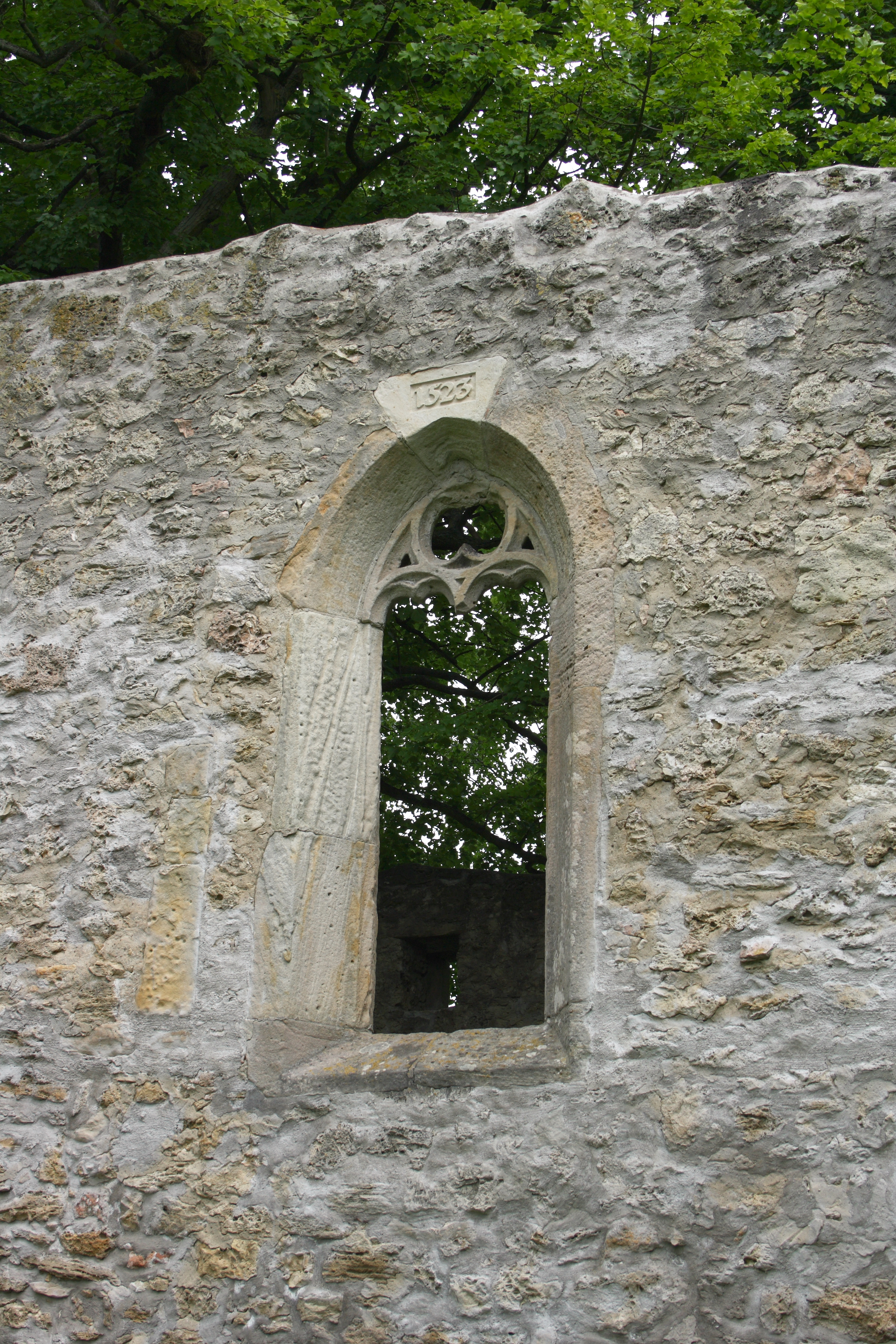 Ehemalige evangelische Pfarrkirche von Abterode, einem Ortsteil von Meißner im Werra-Meißner-Kreis (Hessen), aus dem 14. Jh., Maßwerkfenster mit der Jahreszahl 1523